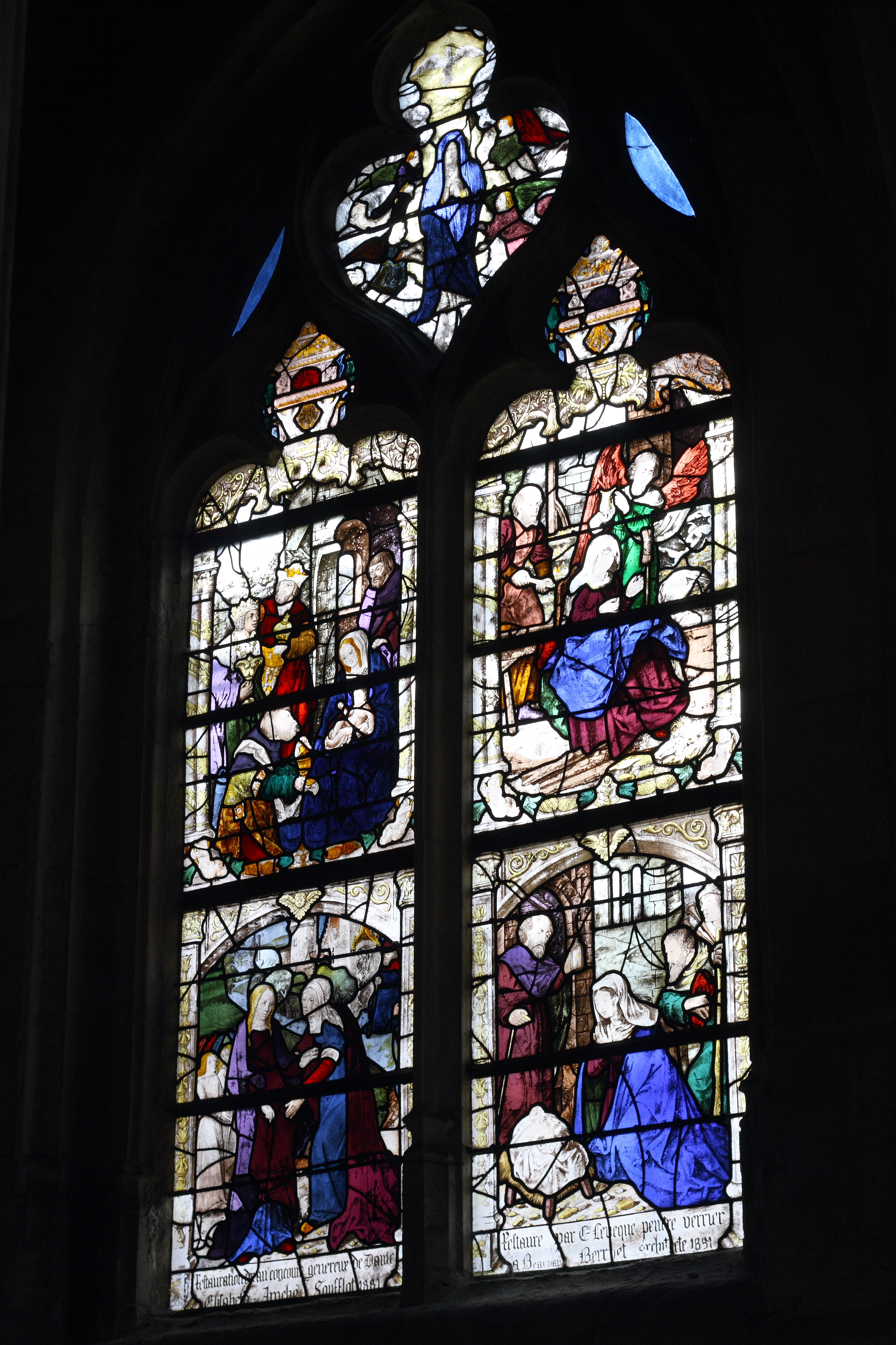 Katholische Pfarrkirche Saint-Martin in Herblay, einer Gemeinde im Département Val d'Oise (Île de France), Bleiglasfenster aus dem 16. Jh., Darstellung: Heimsuchung (unten links), Geburt Jesu (unten rechts), Anbetung durch die Heiligen Drei Könige (oben links)